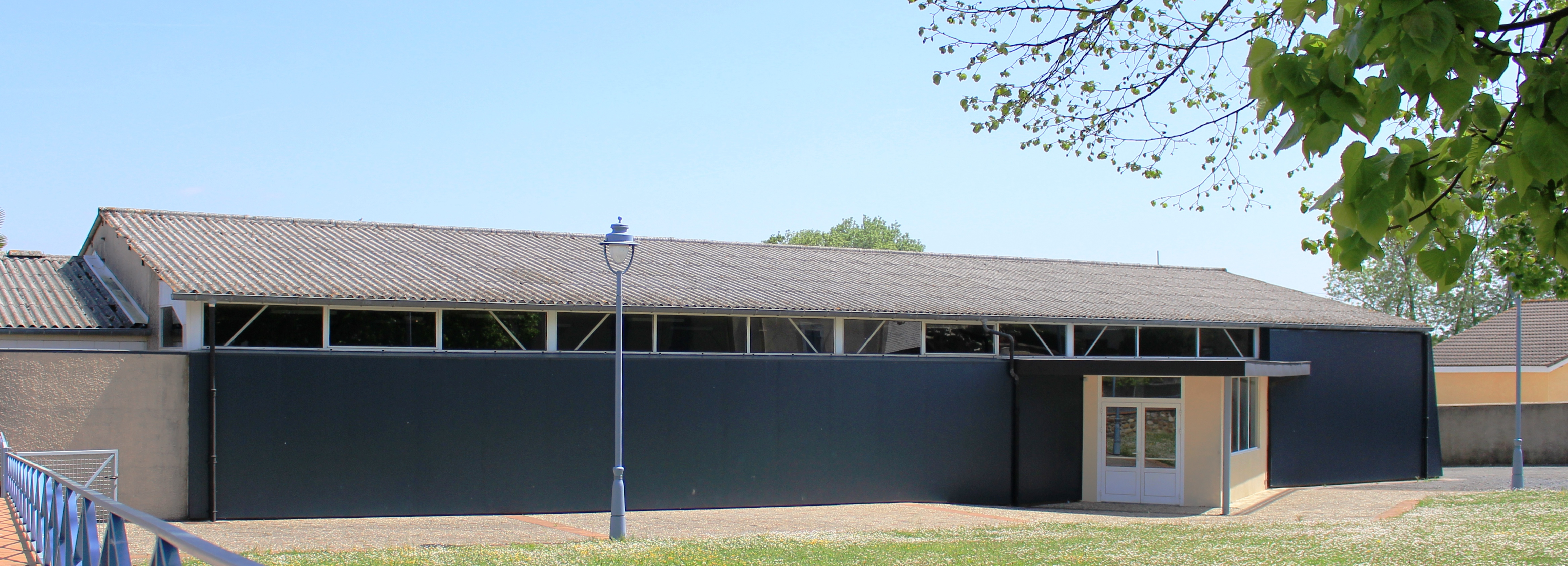 Salle des fêtes de Luquet (Hautes-Pyrénées)